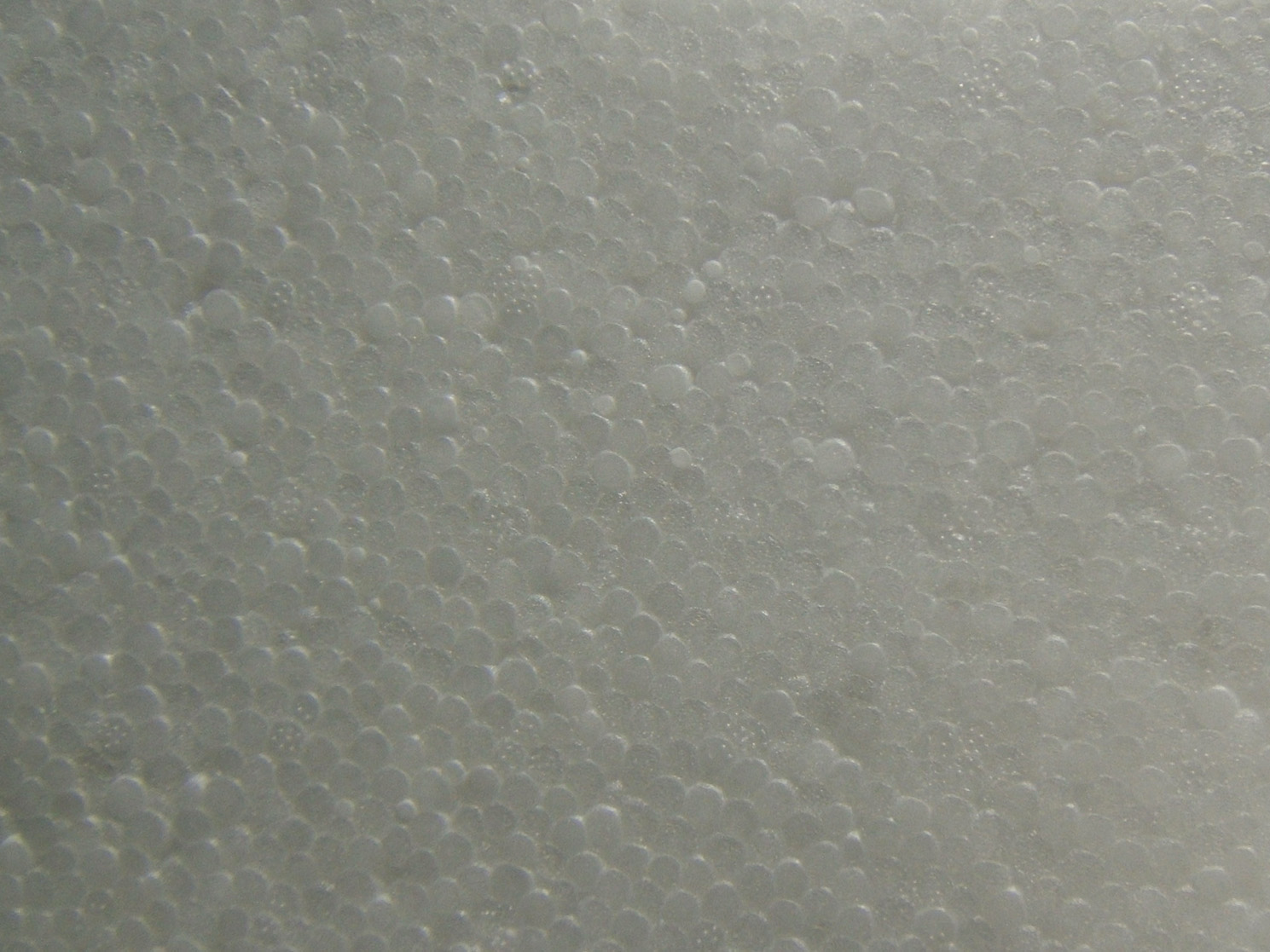 profilo lastra polistirolo espanso